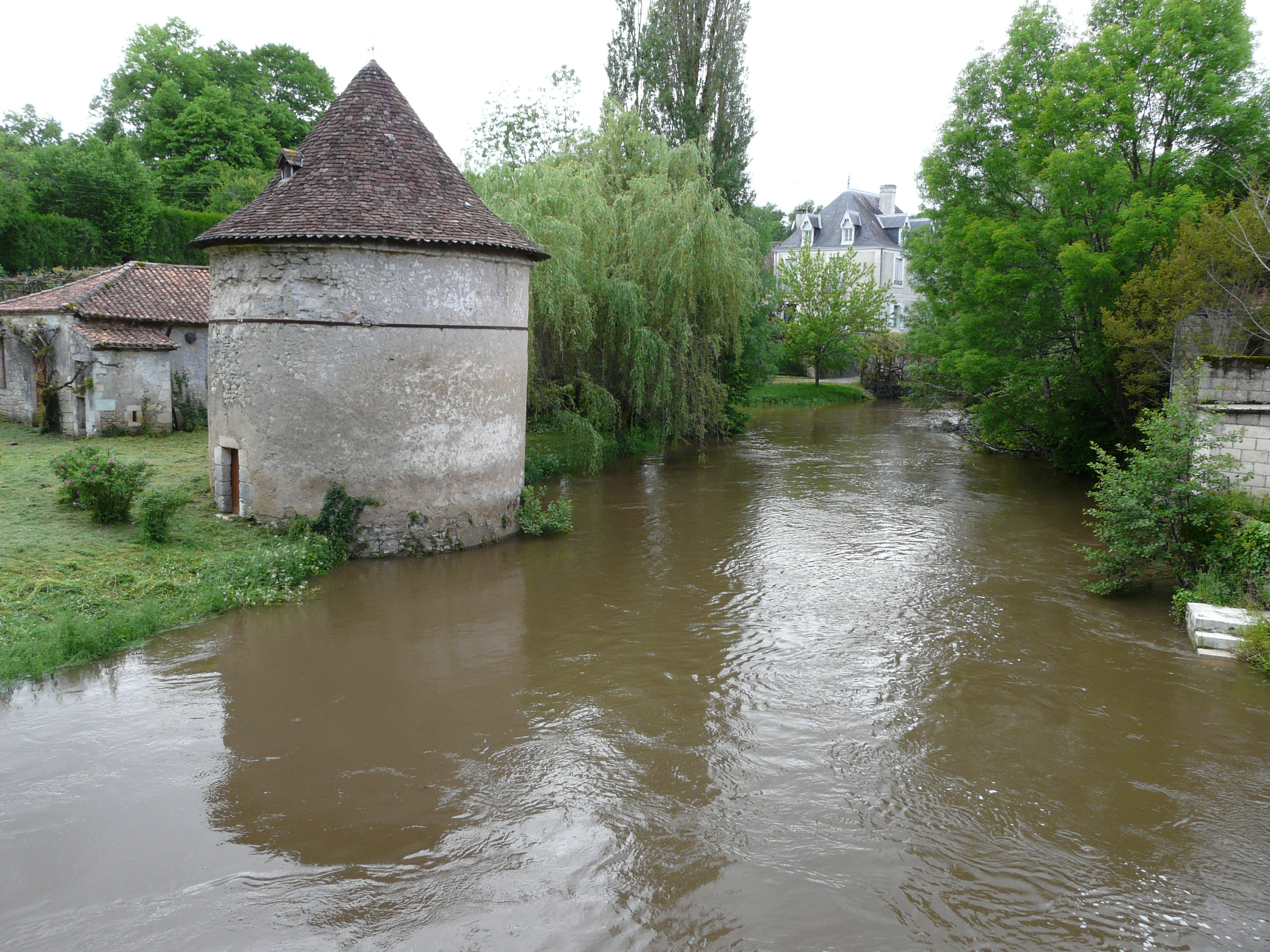 Rivière le Bandiat dans sa traversée du bourg de Javerlhac, Javerlhac-et-la-Chapelle-Saint-Robert, Dordogne, France. Vue vers l'aval.